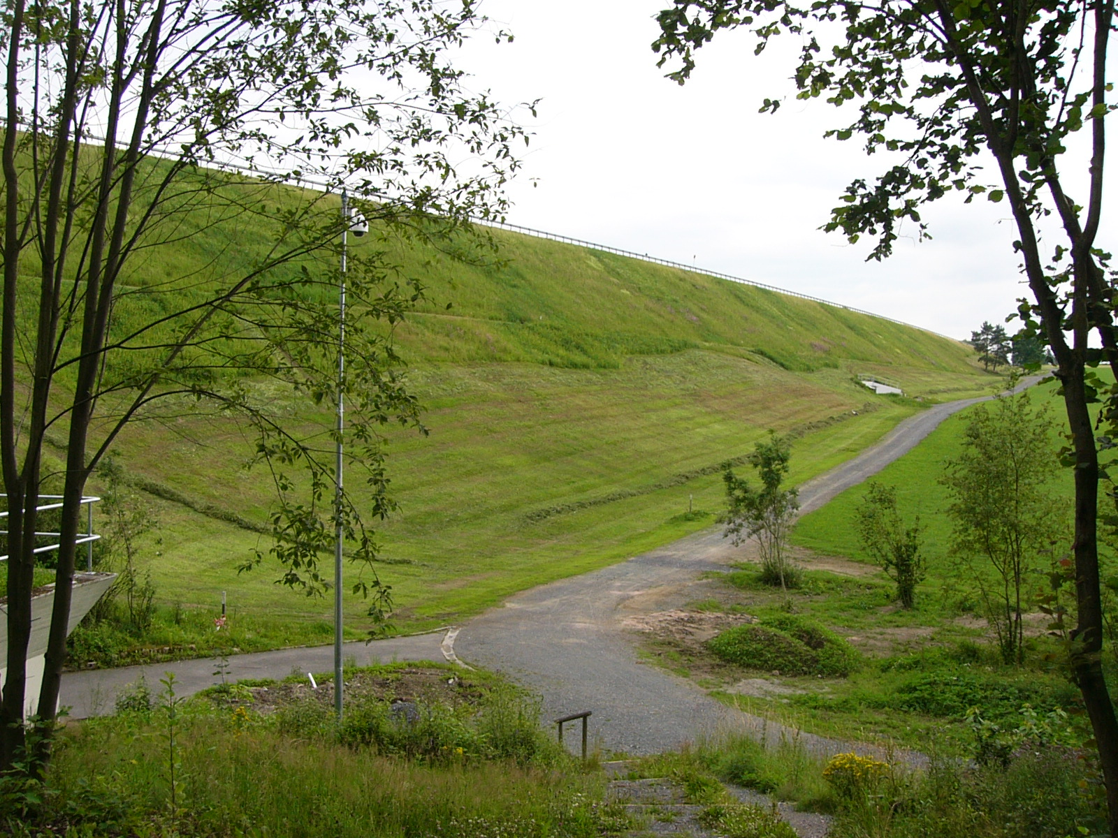 Förmitztalsperre, Damm